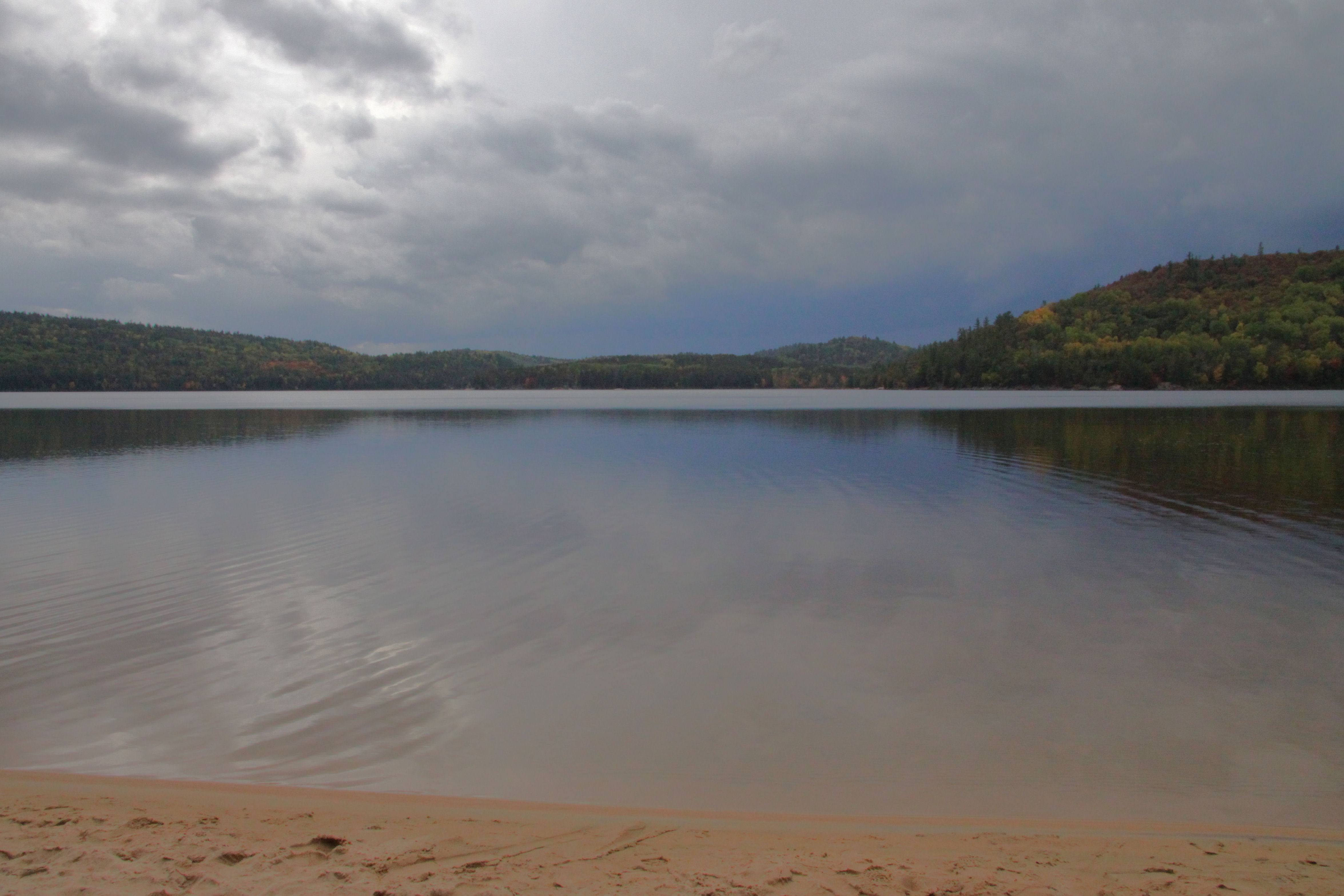 Algonquin Park, Ontario, Canada